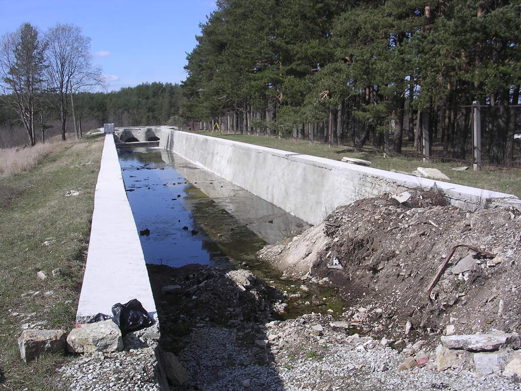 Jägala-Joa